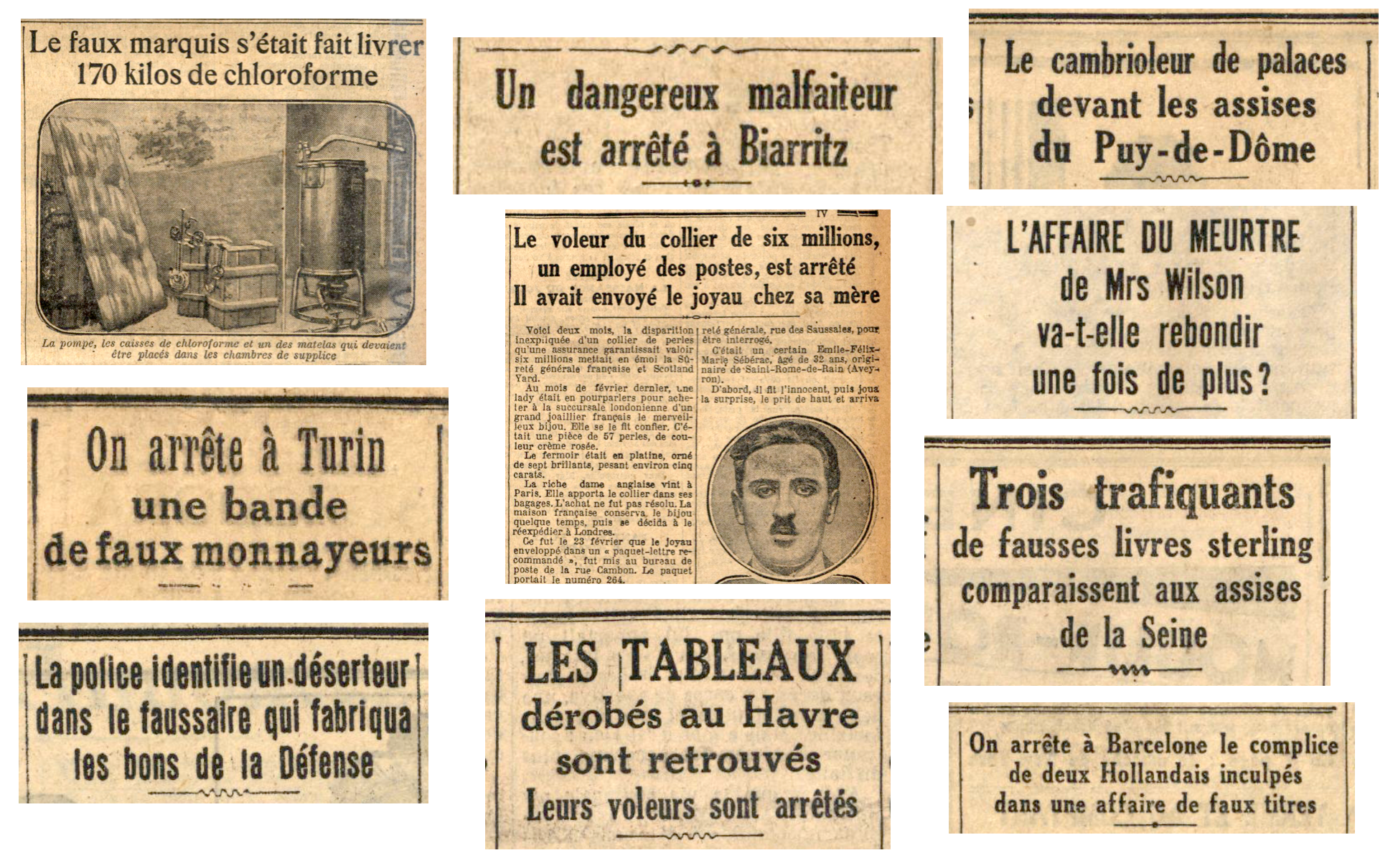 Les affaires criminelles où la presse mentionne Bonny : l'exemple du quotidien Le Journal : Le faux marquis s'était fait livrer 170 kilos de chloroforme Le Journal, 29 septembre 1924 On arrête à Turin une bande de faux monnayeurs Le Journal, 1er mai 1925 La police identifie un déserteur dans le faussaire qui fabriqua les bons de la Défense Le Journal, 6 octobre 1925 Un dangereux malfaiteur arrêté à Biarritz Le Journal, 13 septembre 1927 Le voleur du collier de 6 millions, un employé des postes, est arrêté. Il avait envoyé le joyau chez sa mère Le Journal, 16 avril 1928 Les tableaux dérobés au Havre sont retrouvés. Leurs voleurs sont arrêtés. Le Journal, 7 mars 1929 Le cambrioleur de palaces devant les assises du Puy-de-Dôme Le Journal, 2 mai 1929 L'affaire du meurtre de Mrs Wilson va-t-elle rebondir une fois de plus ? Le Journal, 15 novembre 1930 Trois trafiquants de fausses livres sterling comparaissent aux assises de la Seine Le Journal, 20 octobre 1931 On arrête à Barcelone le complice de deux Hollandais inculpés dans une affaire de faux titres Le Journal, 26 septembre 1933